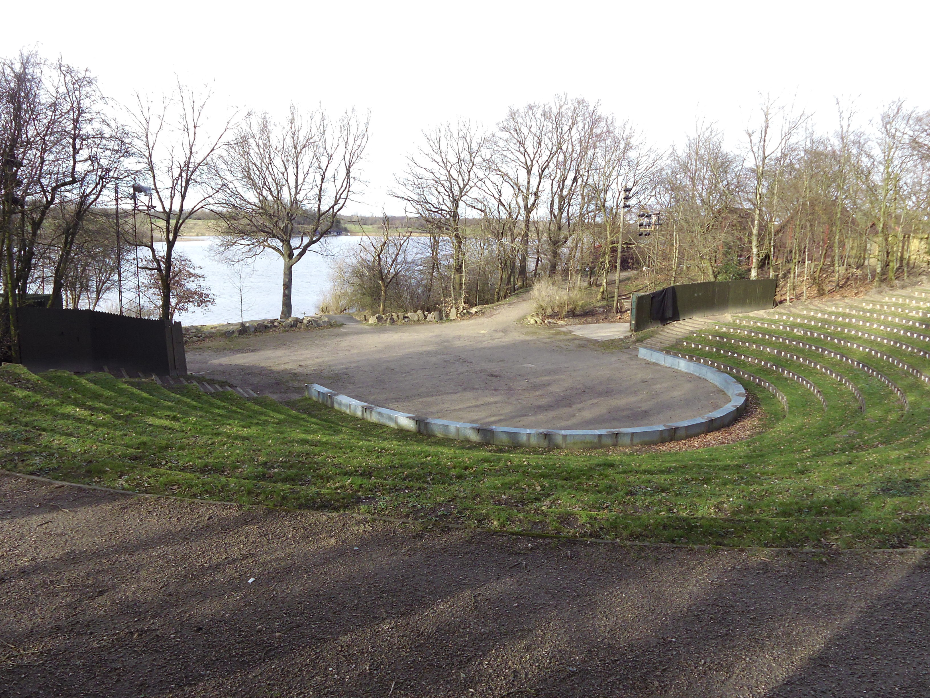 Jels Vikingespil